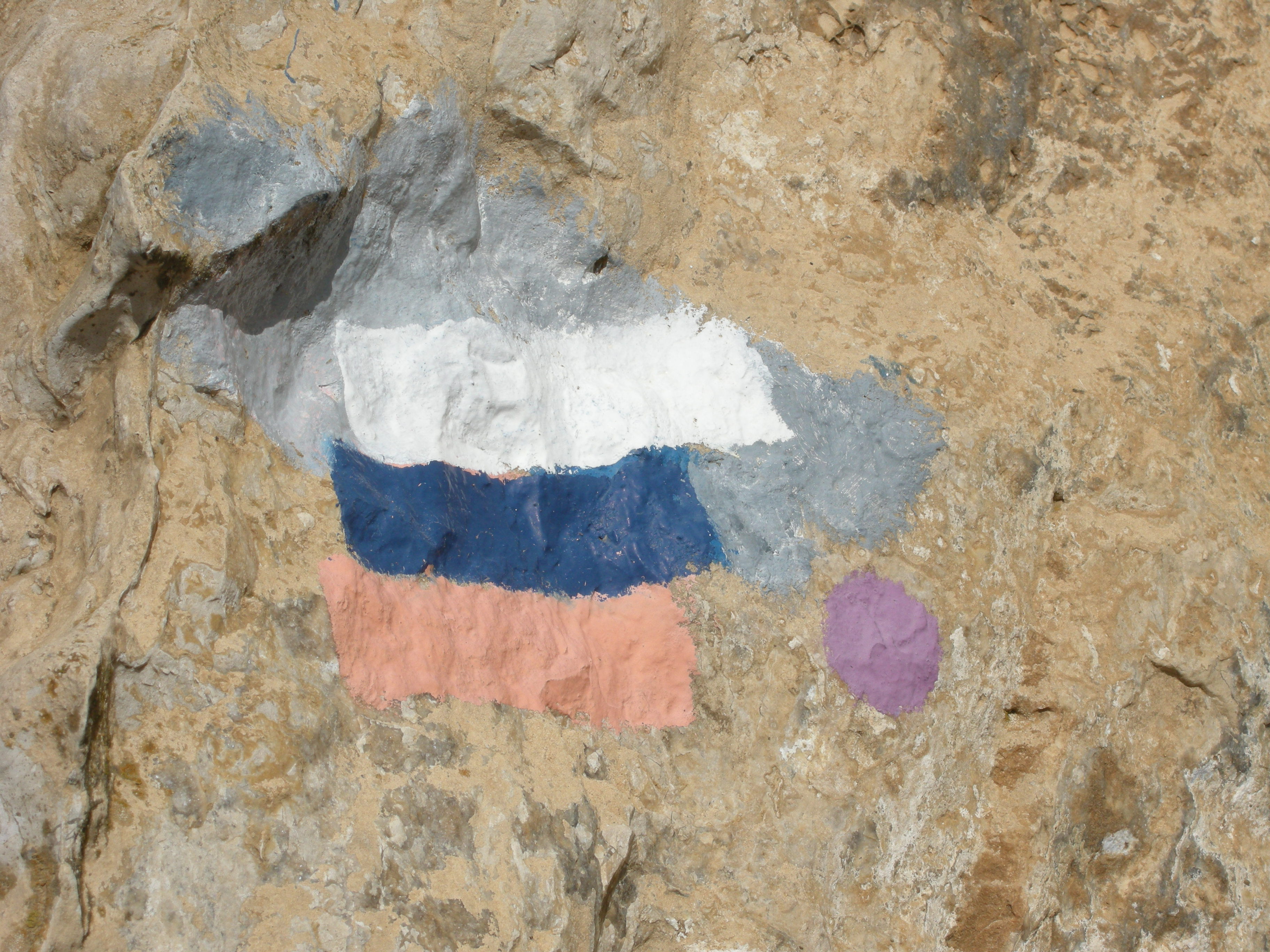 Shvil_israel_ezori